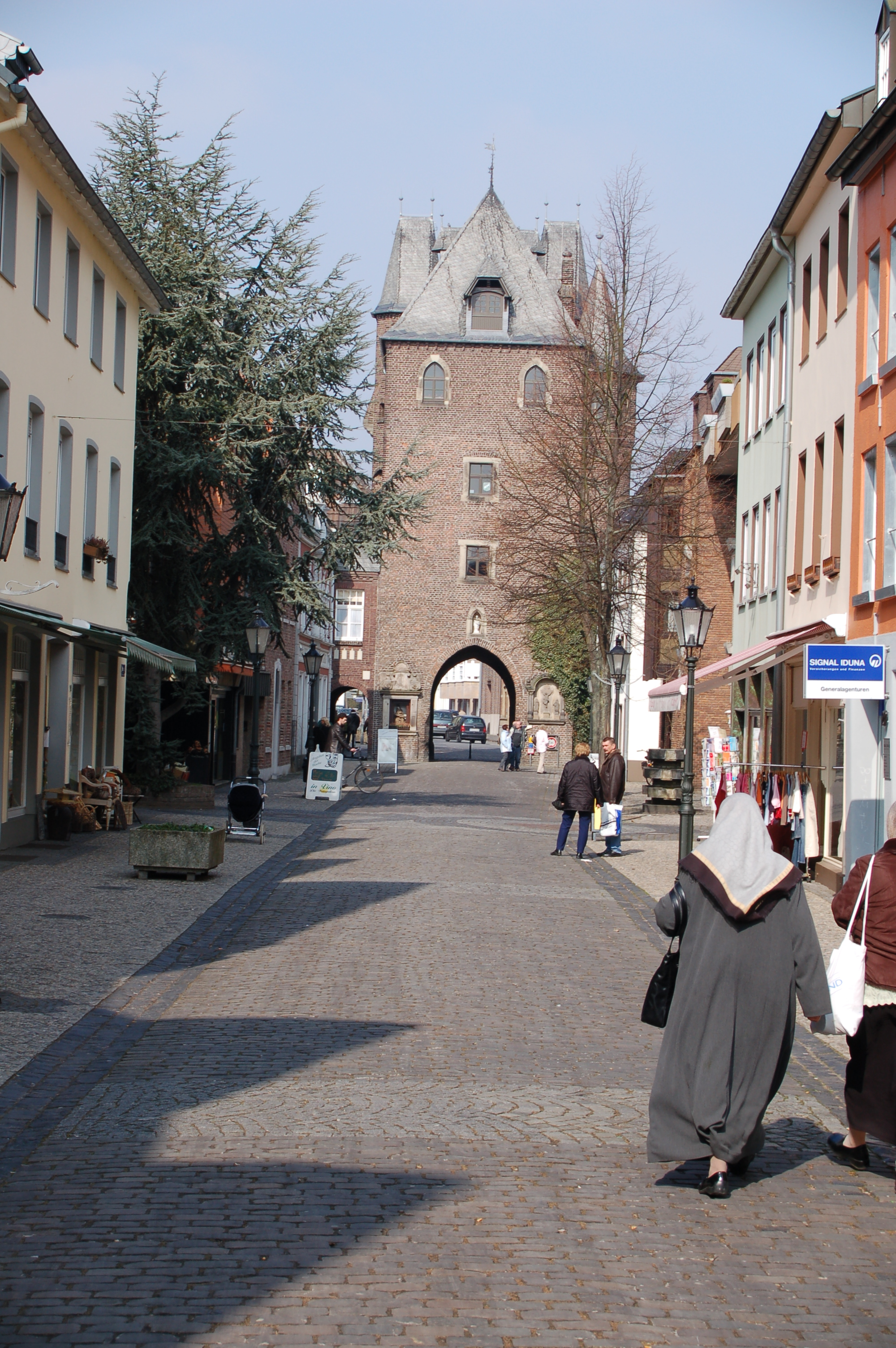 Das Kempener Kuhtor